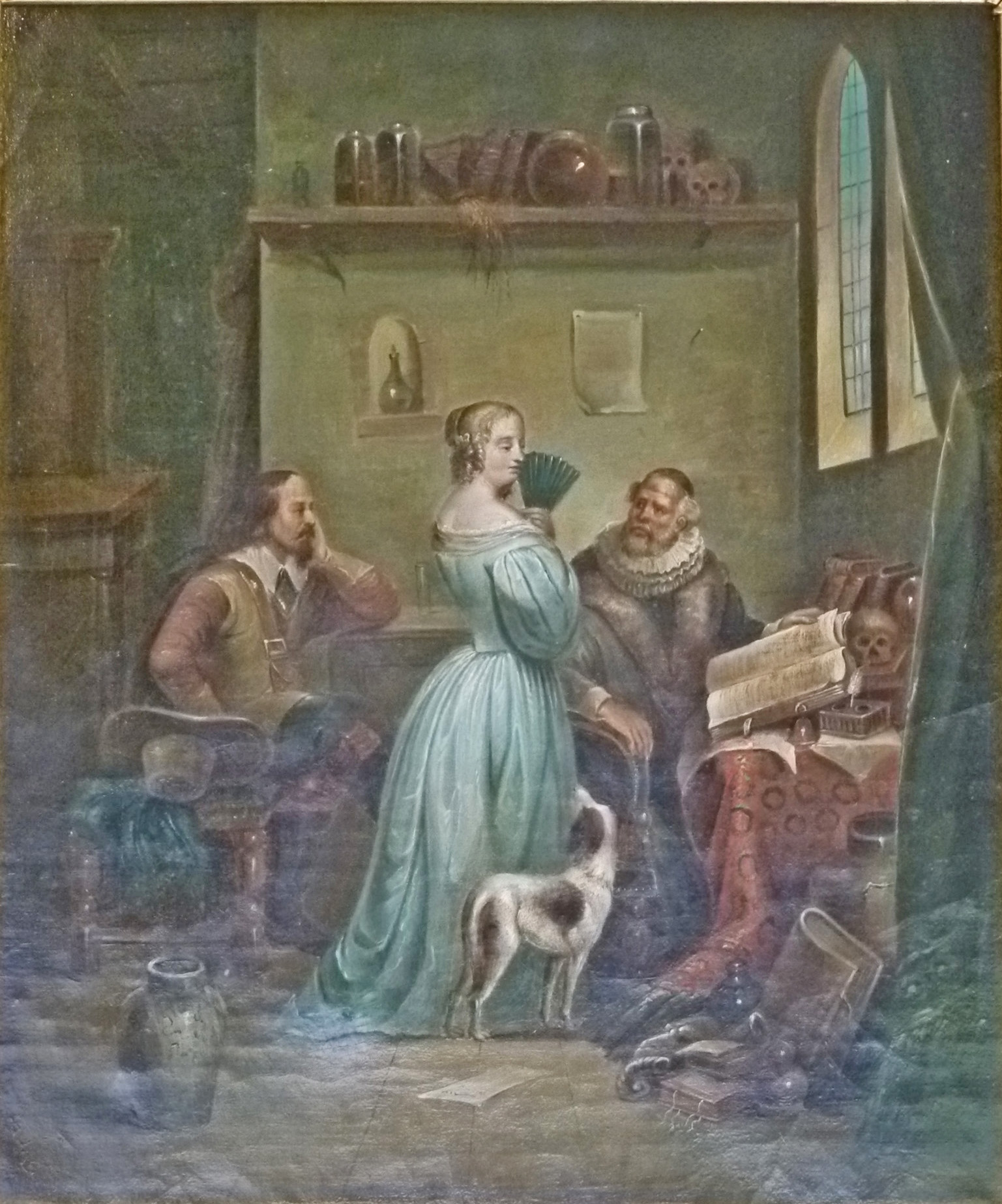 "De Lezing", olieverf op doek, toegeschreven aan Franz Moormans; 32 x 28 cm; privébezit